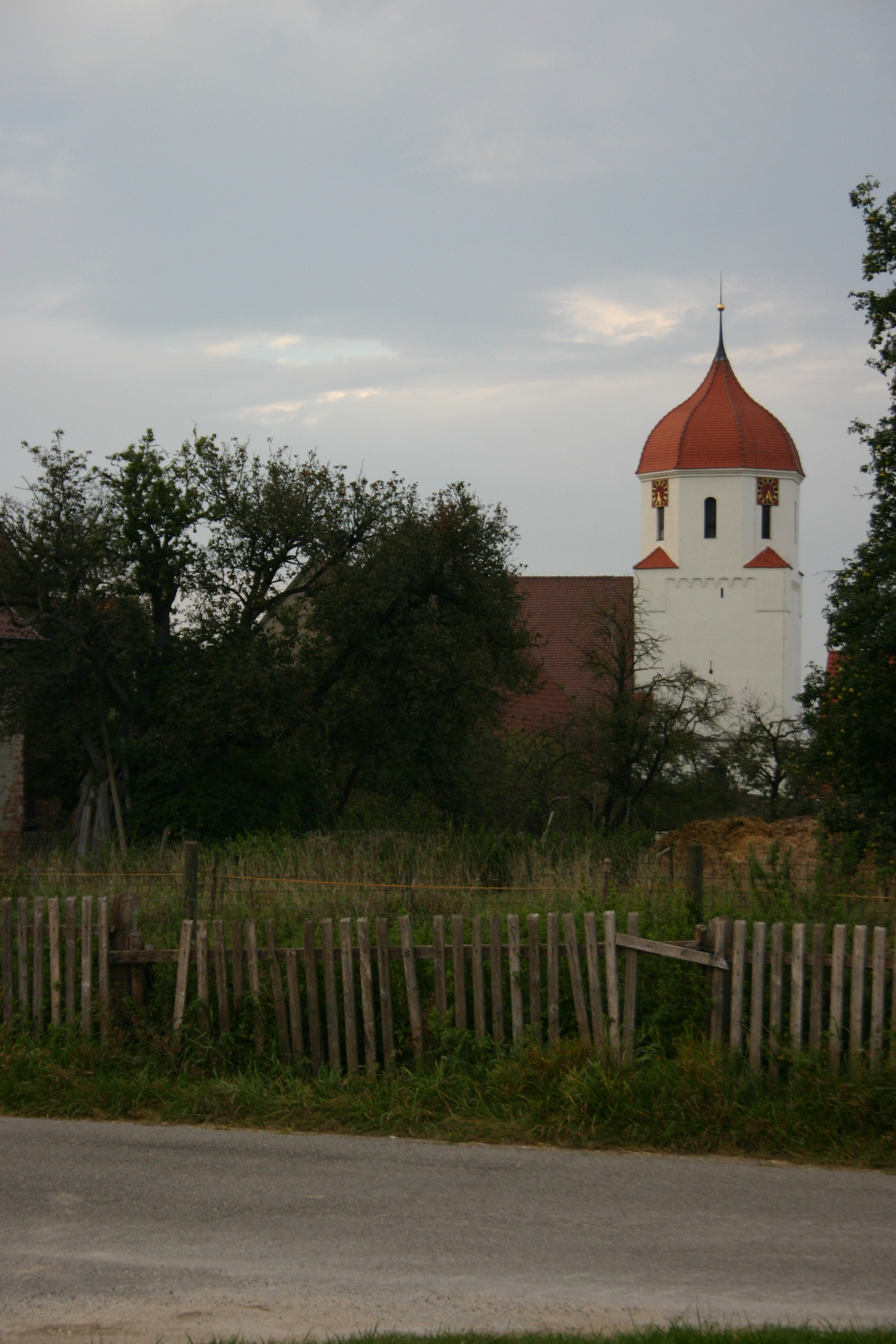 Ev. kirche ulm-jungingen, am 15.11.2004